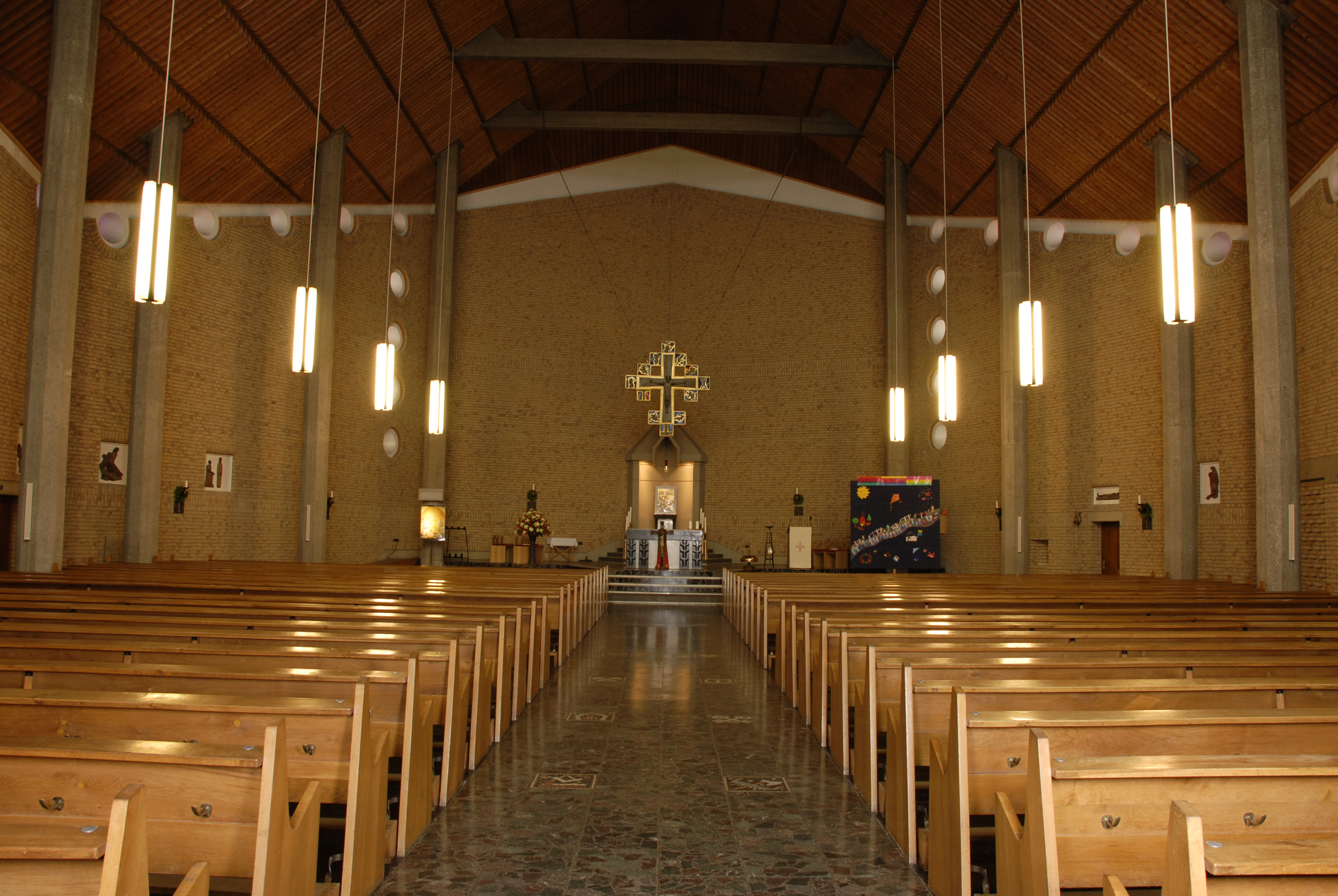 Innenraum der Ochtendunger Kirche St. Martin mit Blick auf den Altar